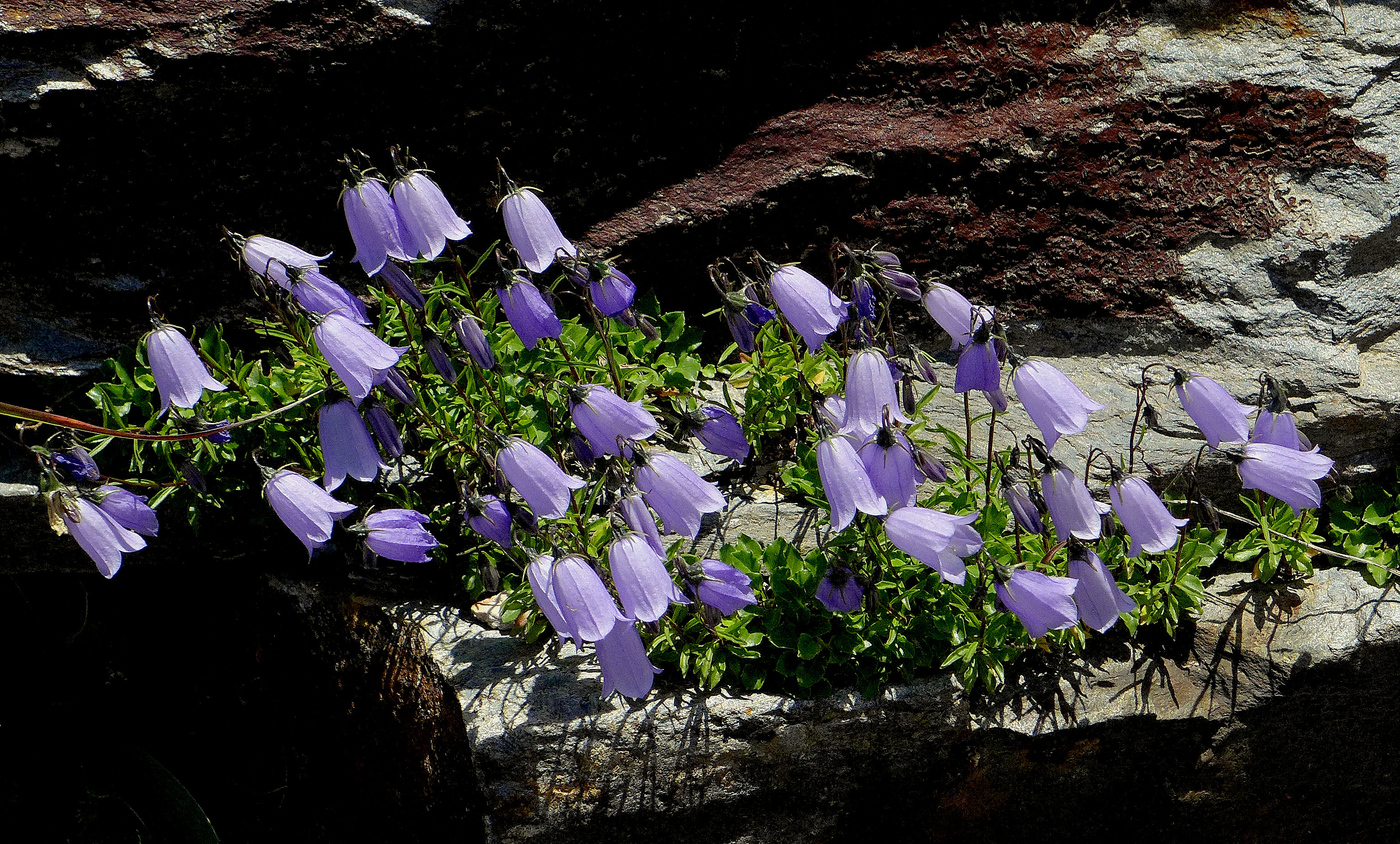 Encián a svájci Alpokból (Albula-hágó)